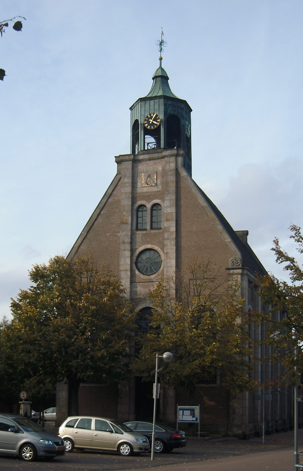 Evangelisch-refomierte Kirche Neuenhaus aus dem Jahr 1684